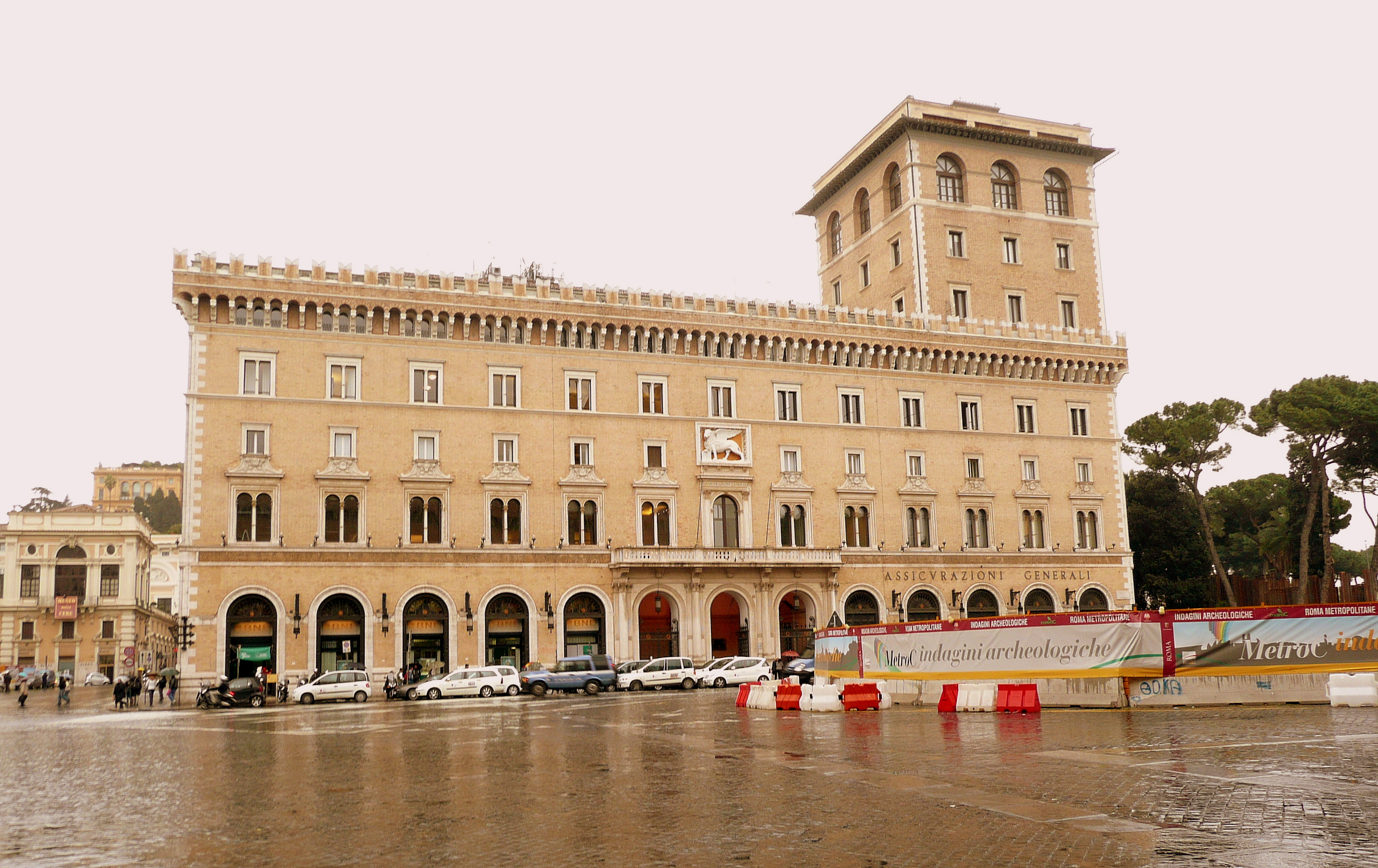 Palazzo delle Assicurazioni Generali in Rome, Piazza Venezia